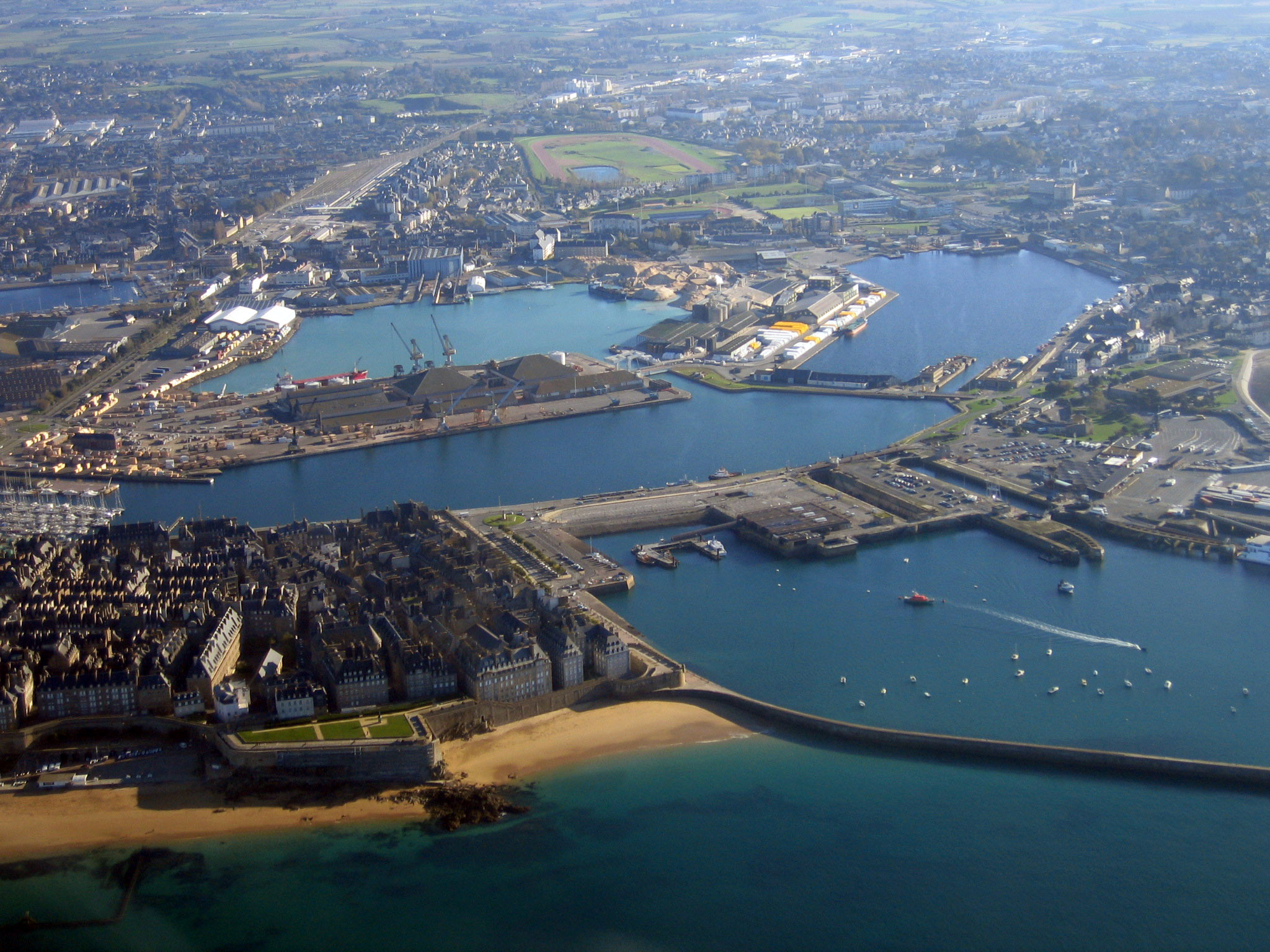 Saint Malo